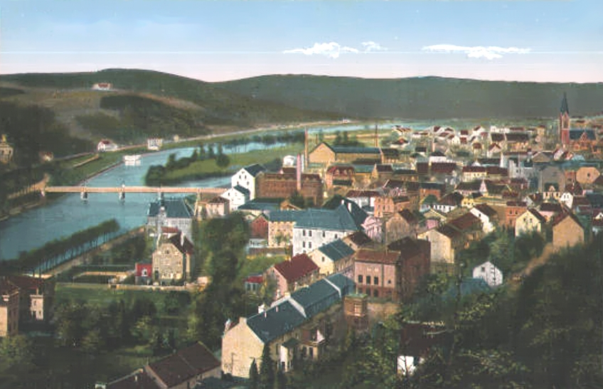 Ansicht der Stadt Werden um 1916